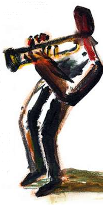 Immagine stilizzata di un musicista jazz (mia elaborazione grafica di una locandina pubblicitaria a contenuto non coperto da copyright)